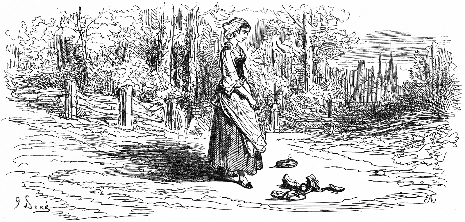 grafika z książki PL Bajki, Jean de La Fontaine, nakładem i drukiem Jana Noskowskiego, Warszawa 1876